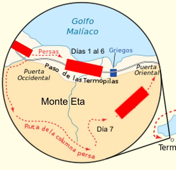 Batalla de Termópilas, año 480 a.C. Rojo: persas. Azul: griegos. Se realizó un zoom en la zona de combate y se establecieron bloques cronológicos (utilizando photopaint), respetando las anotaciones originales, a las cuales se añadió información complementaria.